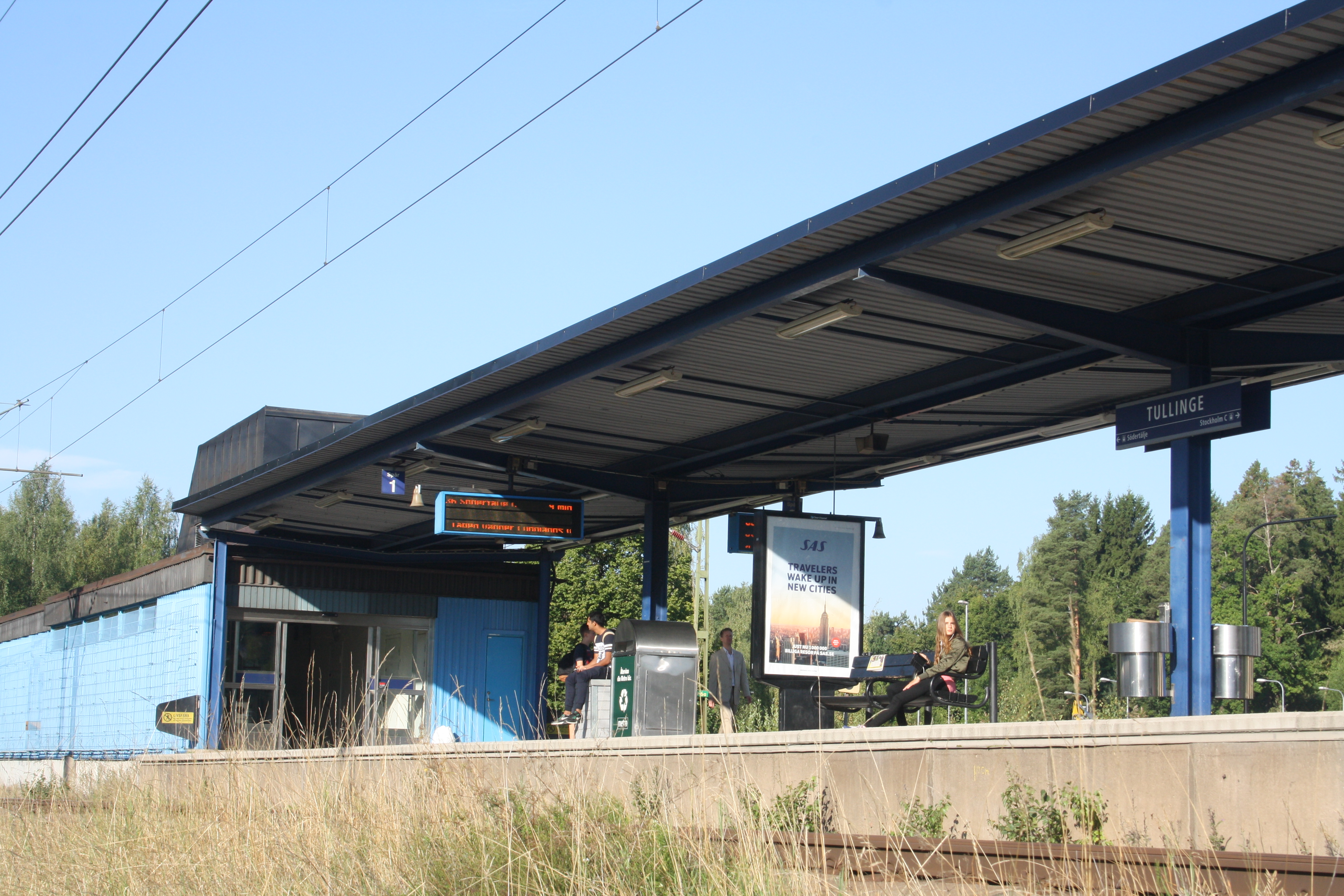 Tullinge station augusti 2016